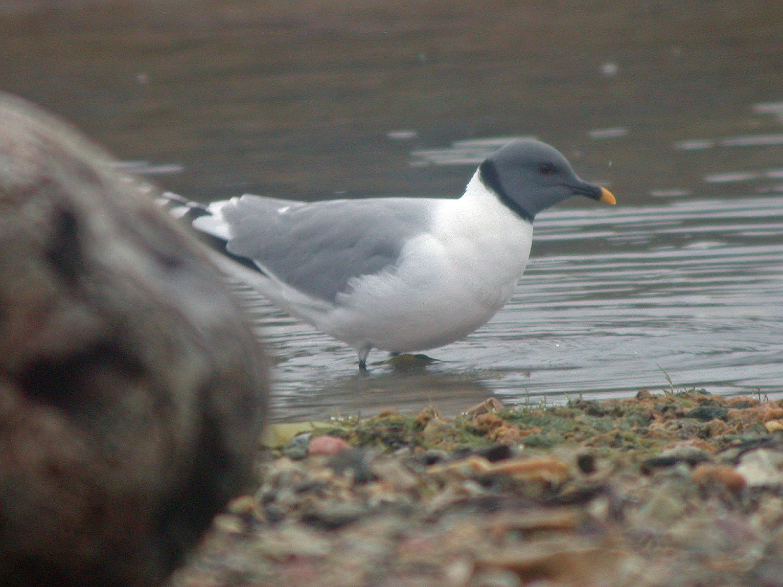 Sabine's Gull Xema sabini, Svalbard, Spitzbergen